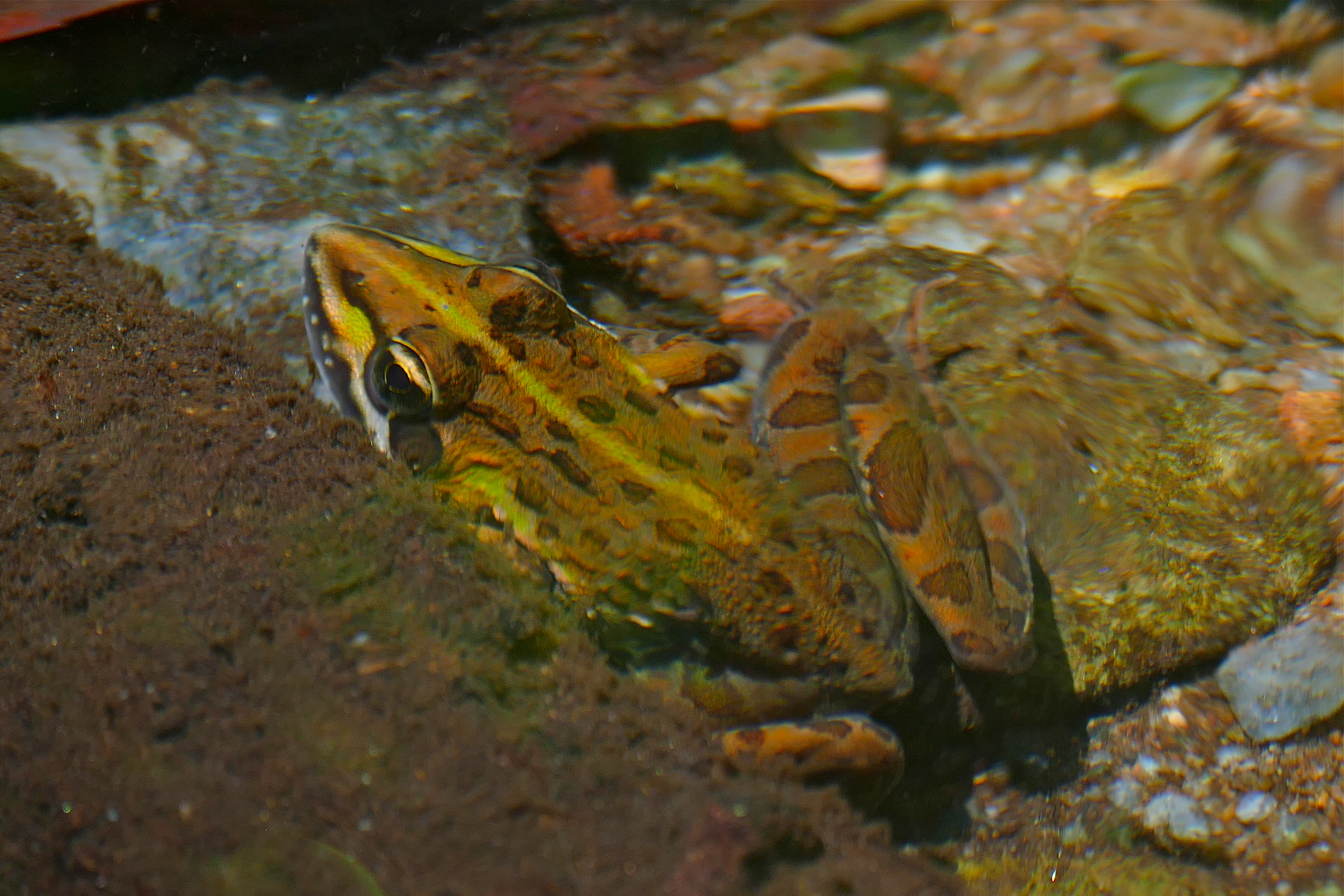 Lekgalameetse Waterfall, Lekgalameetse Provincial Park, Limpopo, SOUTH AFRICA